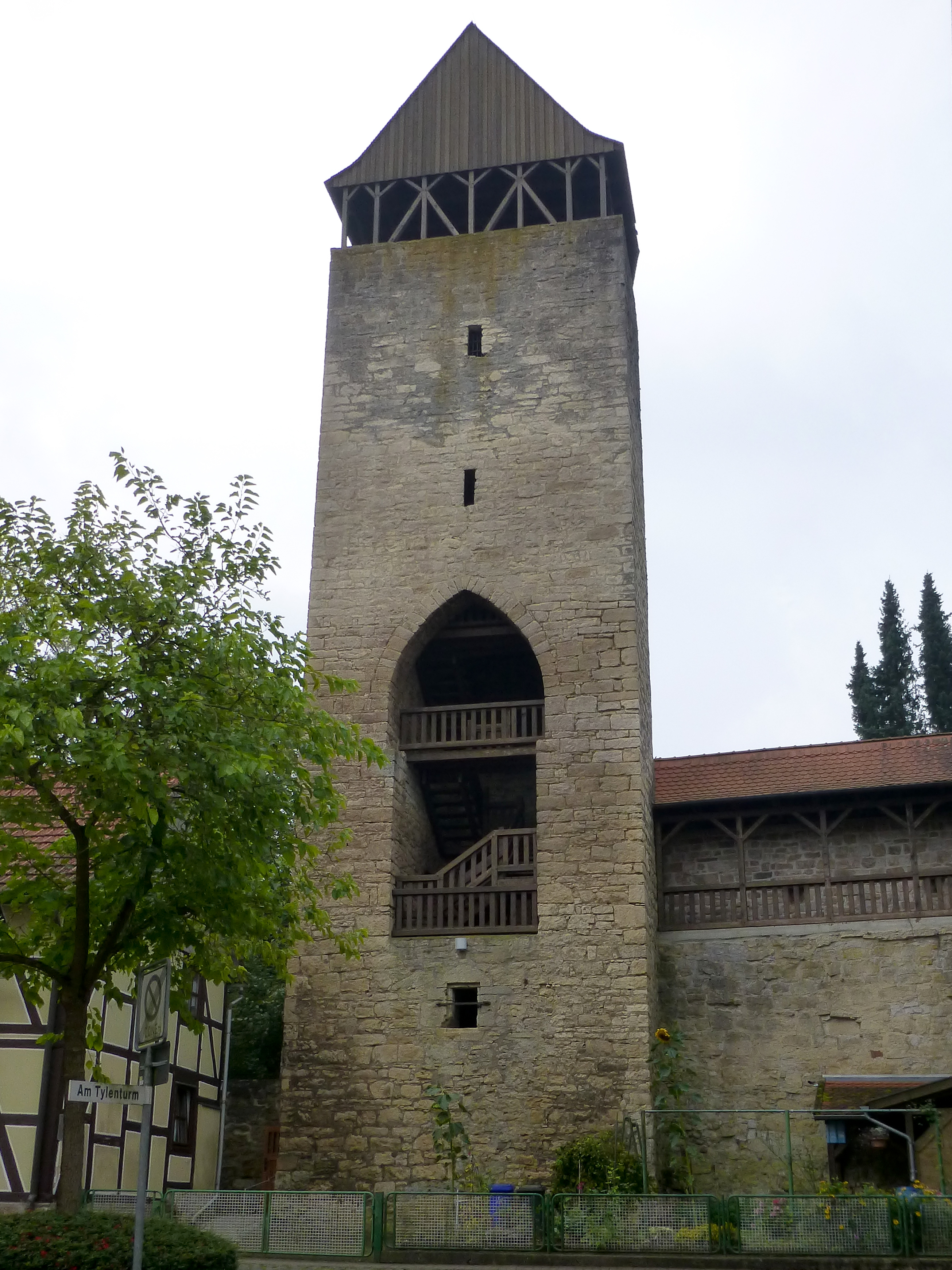 Tylenturm in Korbach; Stadtseite